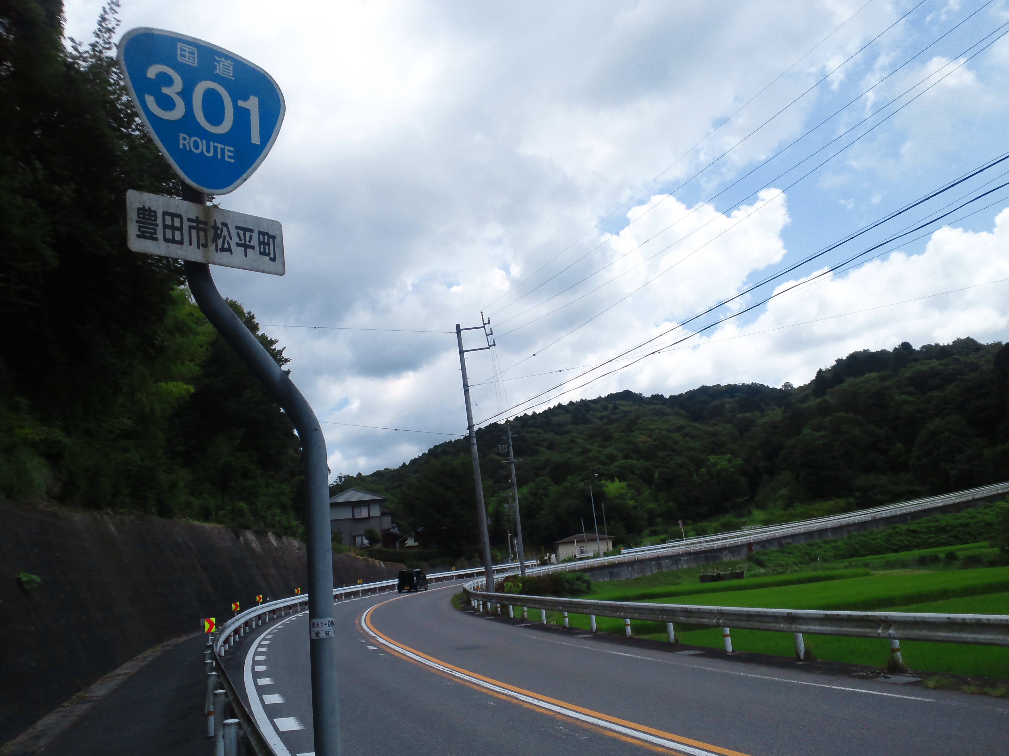 豊田市松平町の国道301号。